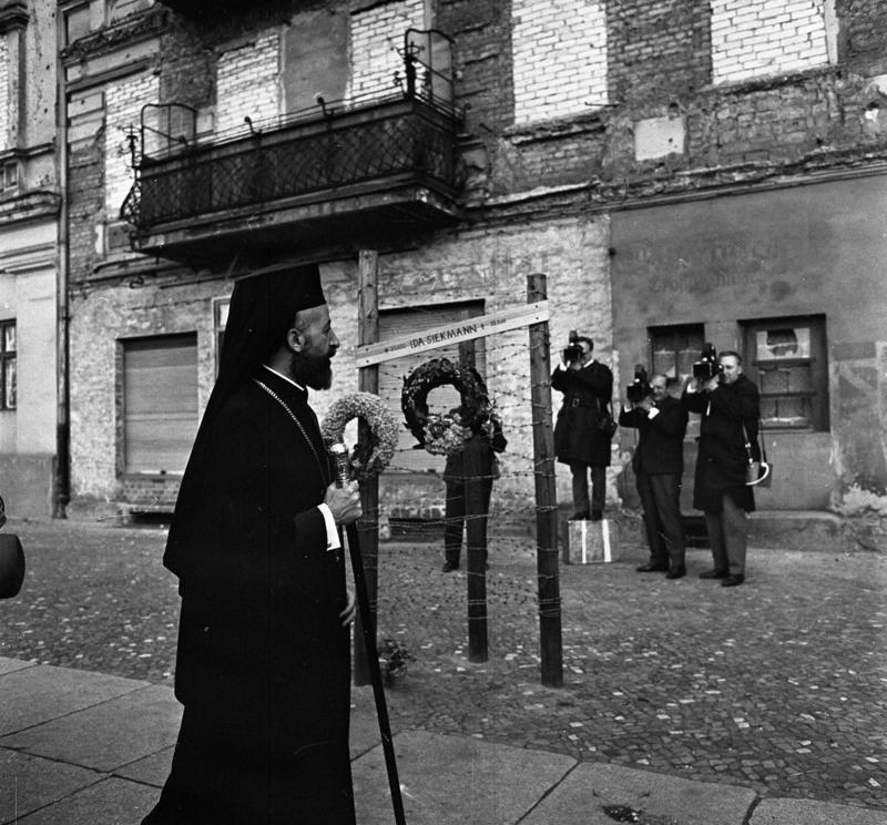 Staatsbesuch Zypern West-Berlin Stadtrundfahrt, Bernauerstr.